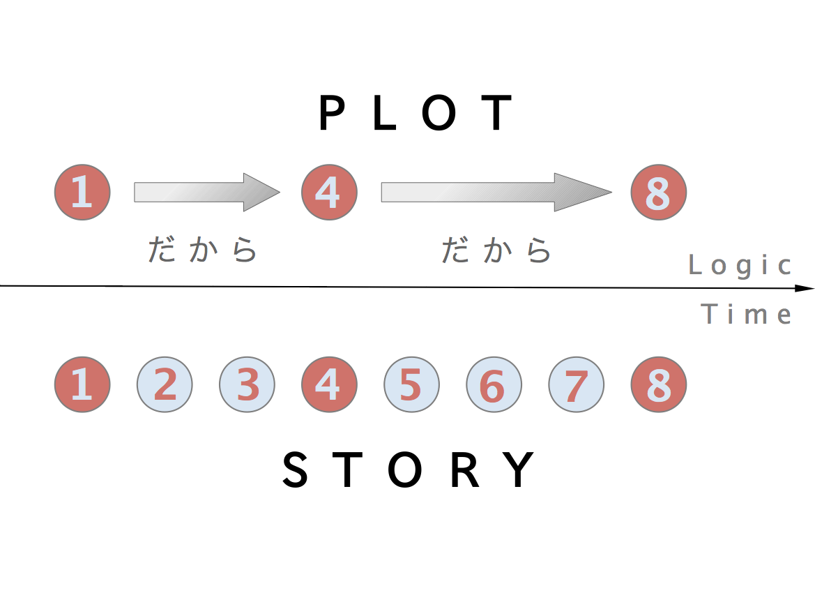 プロットとストーリーの違い。プロットは出来事の因果関係を、ストーリーは出来事の起こる時間順を、それぞれ表わしている。